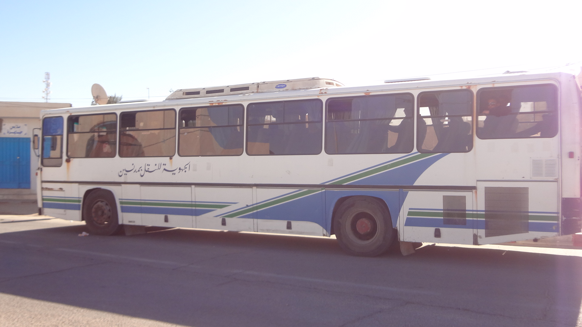 Bus Transport Régional Medenine